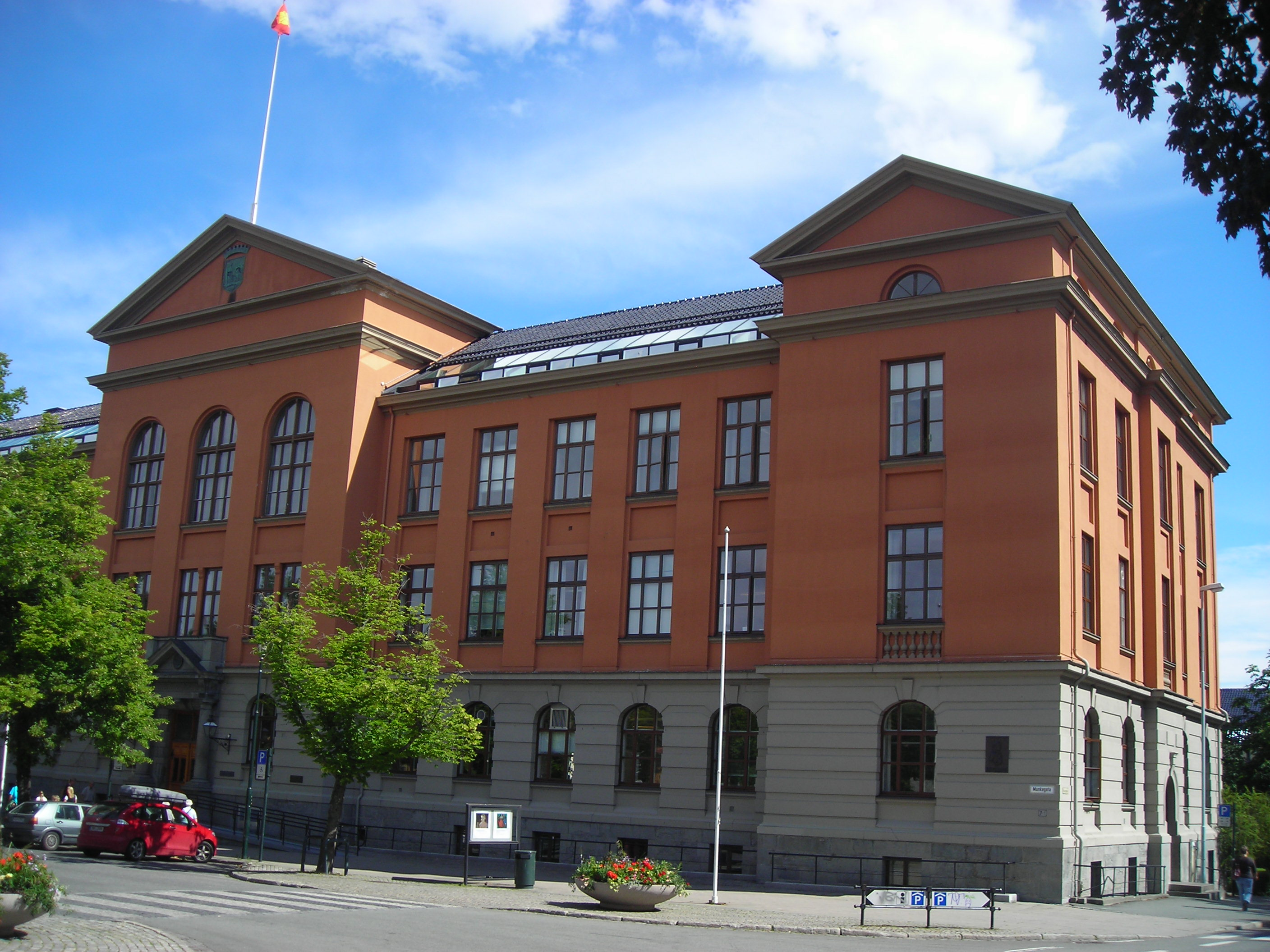 Rådhuset in Trondheim